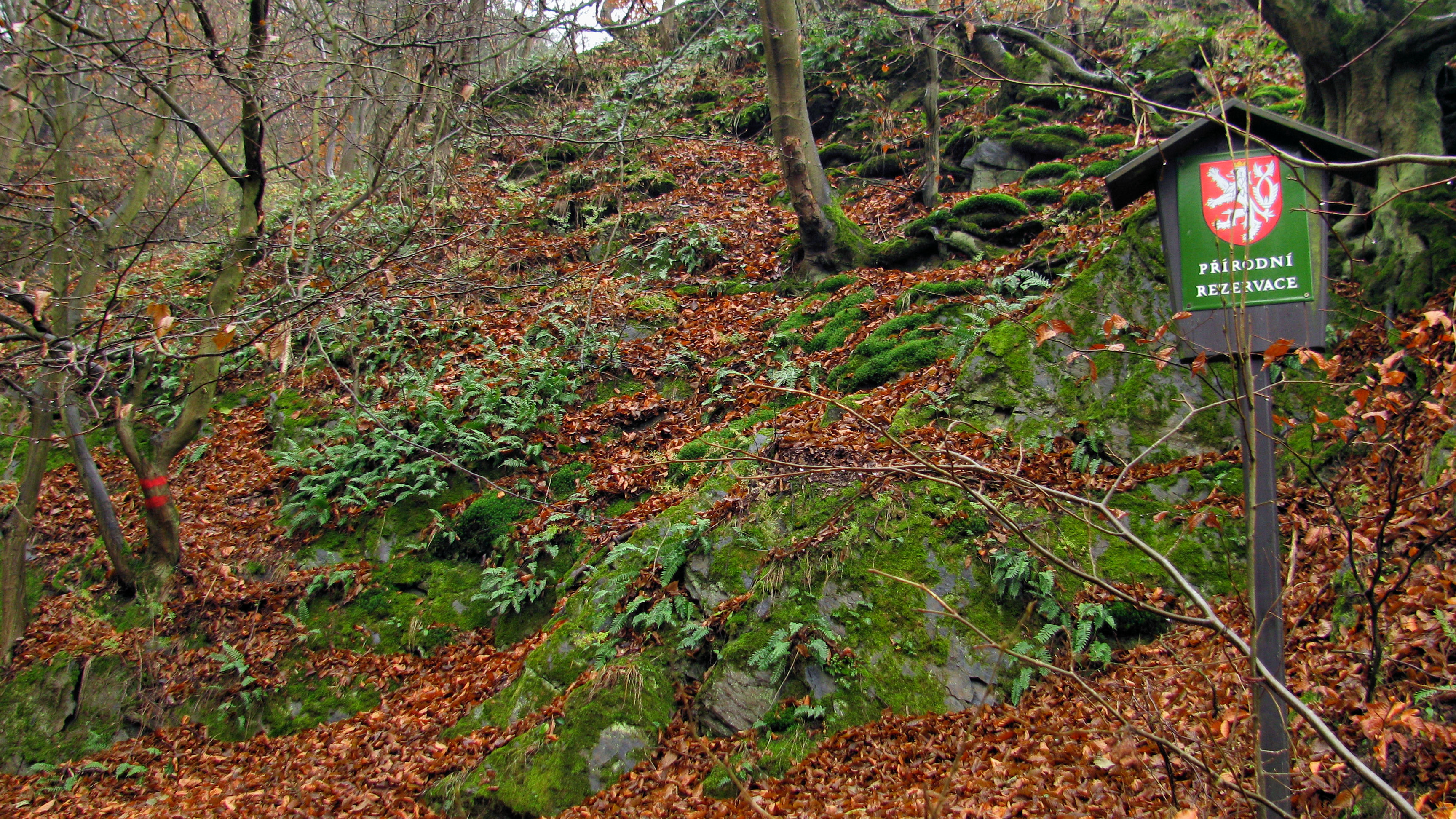 Přírodní rezervace U Eremita